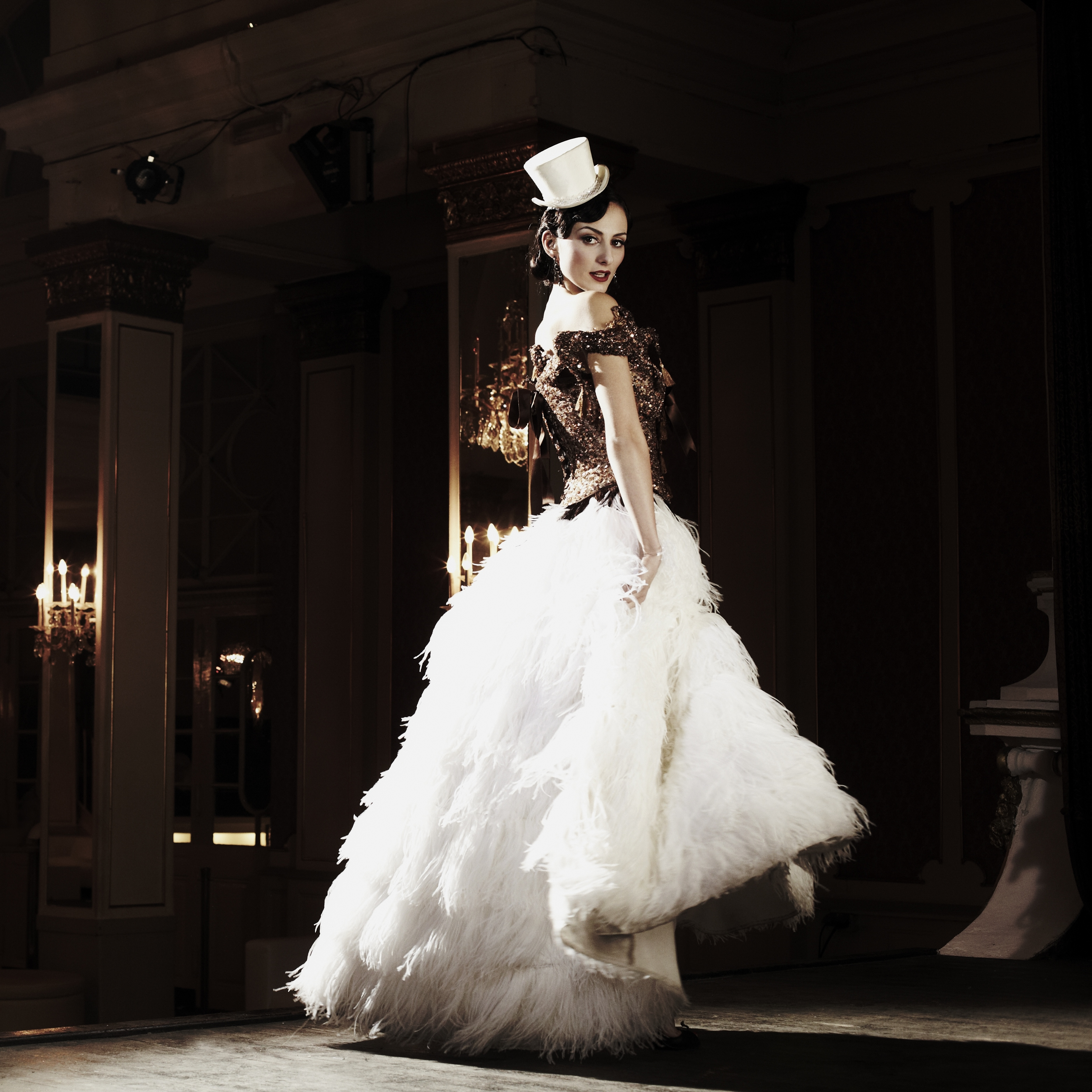 Pressebild von Marla Pétale